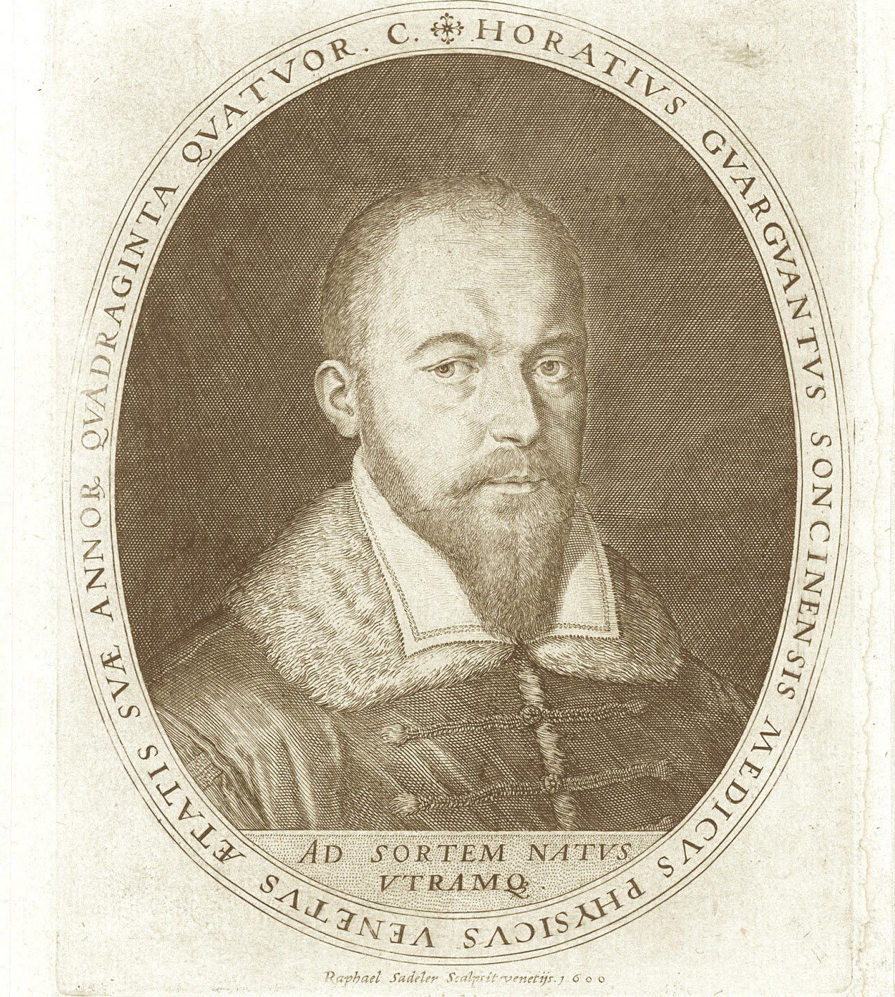 Orazio Guarguanti